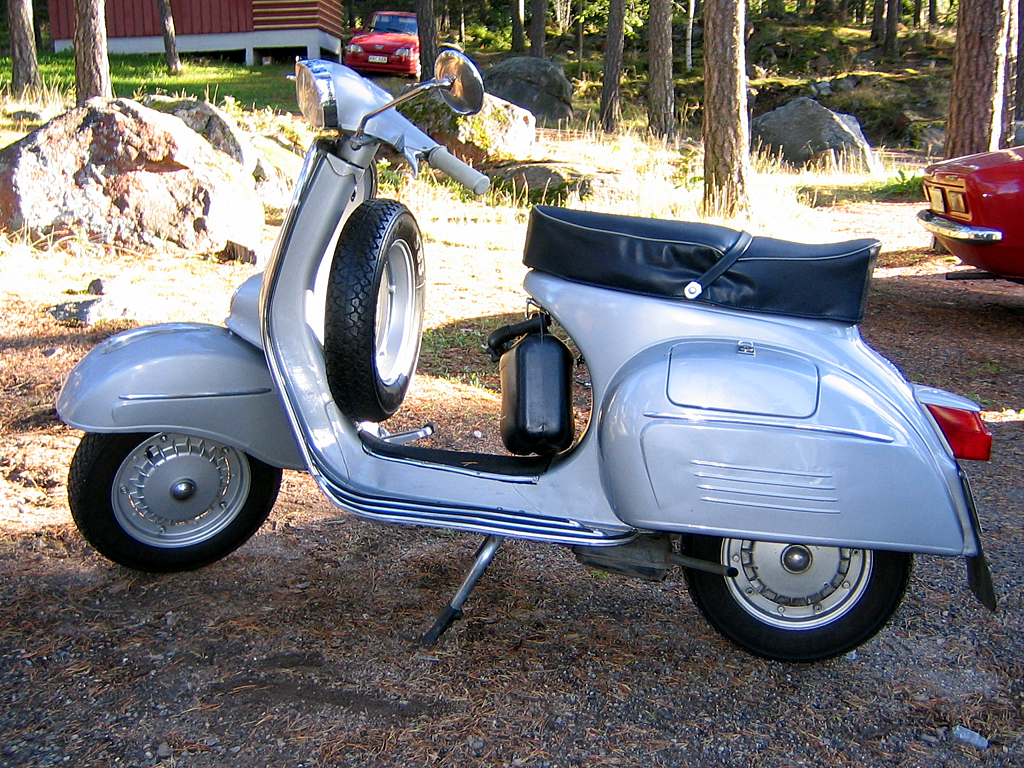 Piaggio's Vespa Sprint 150 (1965)